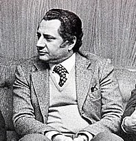 Da esquerda para a direita o deputado federal por São Paulo Ulysses Guimarães, o prefeito de Campinas Magalhães Teixeira e o senador por São Paulo Orestes Quércia durante visita ao Palácio dos Jequitibás, sede da prefeitura de Campinas.